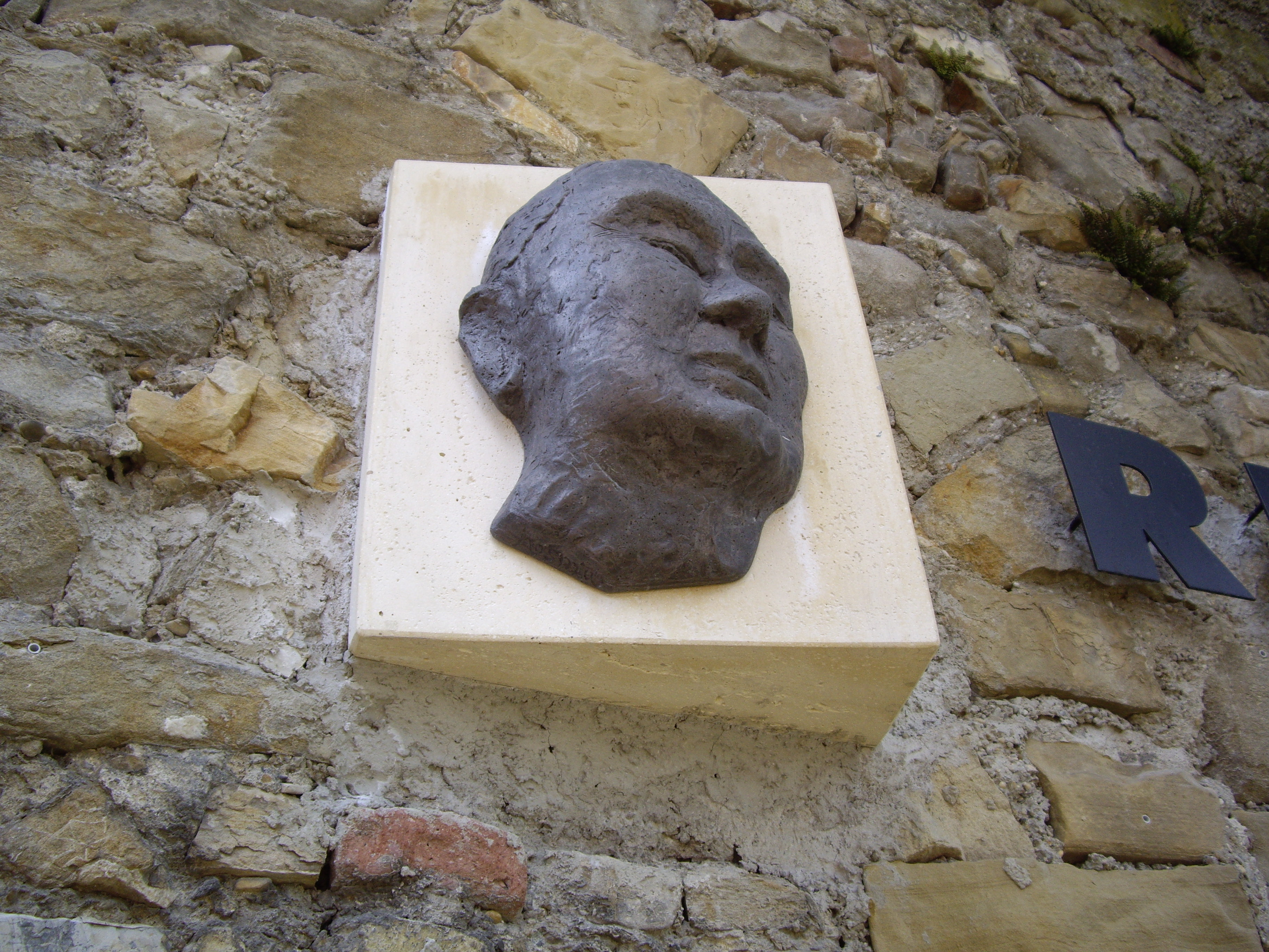 La portreto Richard Coudenhove-Kalergi de skulpisto Thomas KOSMA sur la urbomuro de Klostronovburgo, Urbo de la Interpopola Kompreniĝo, en la Eŭropo-placo.